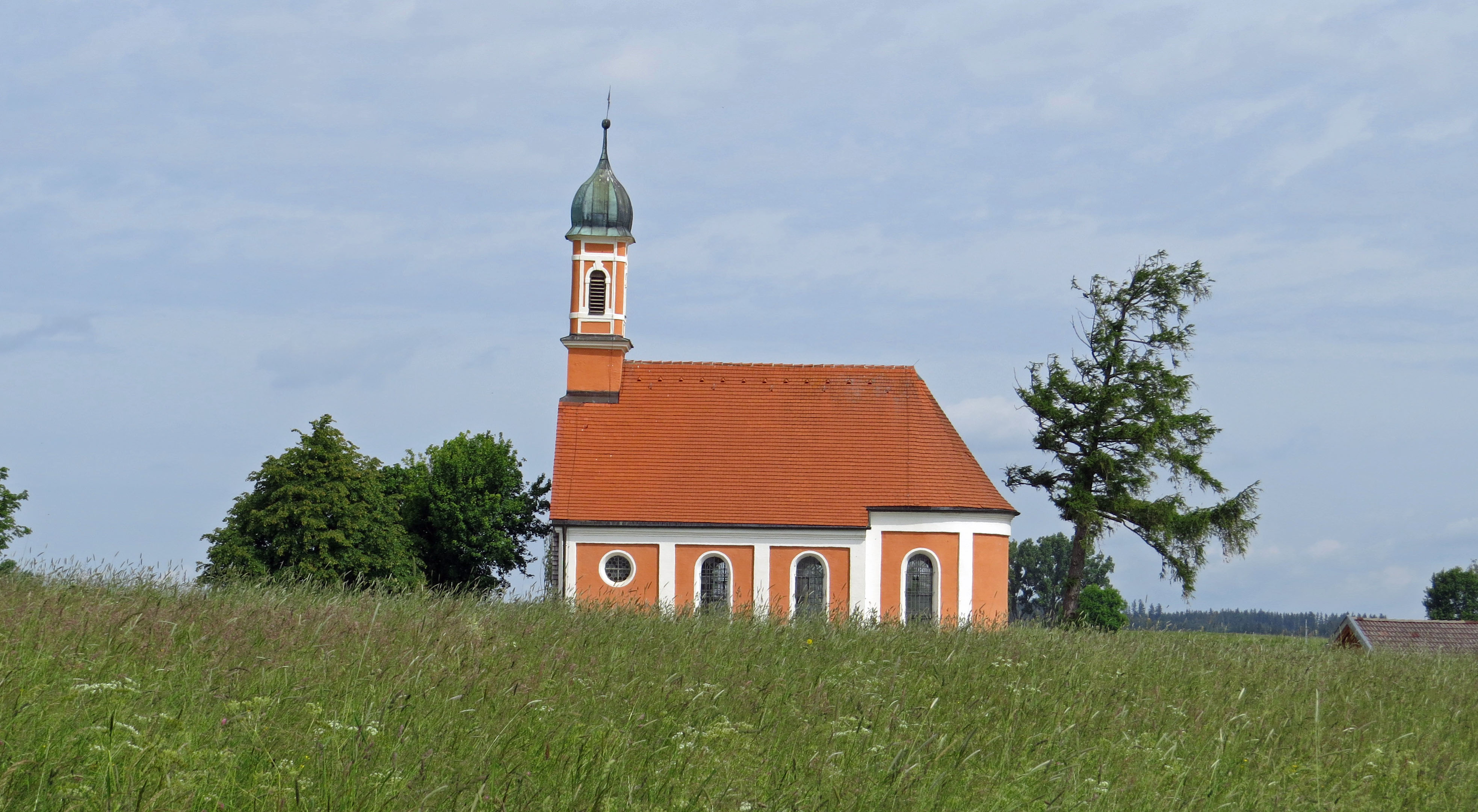 Antoniuskapelle bei Dösingen, Westendorf (Allgäu)